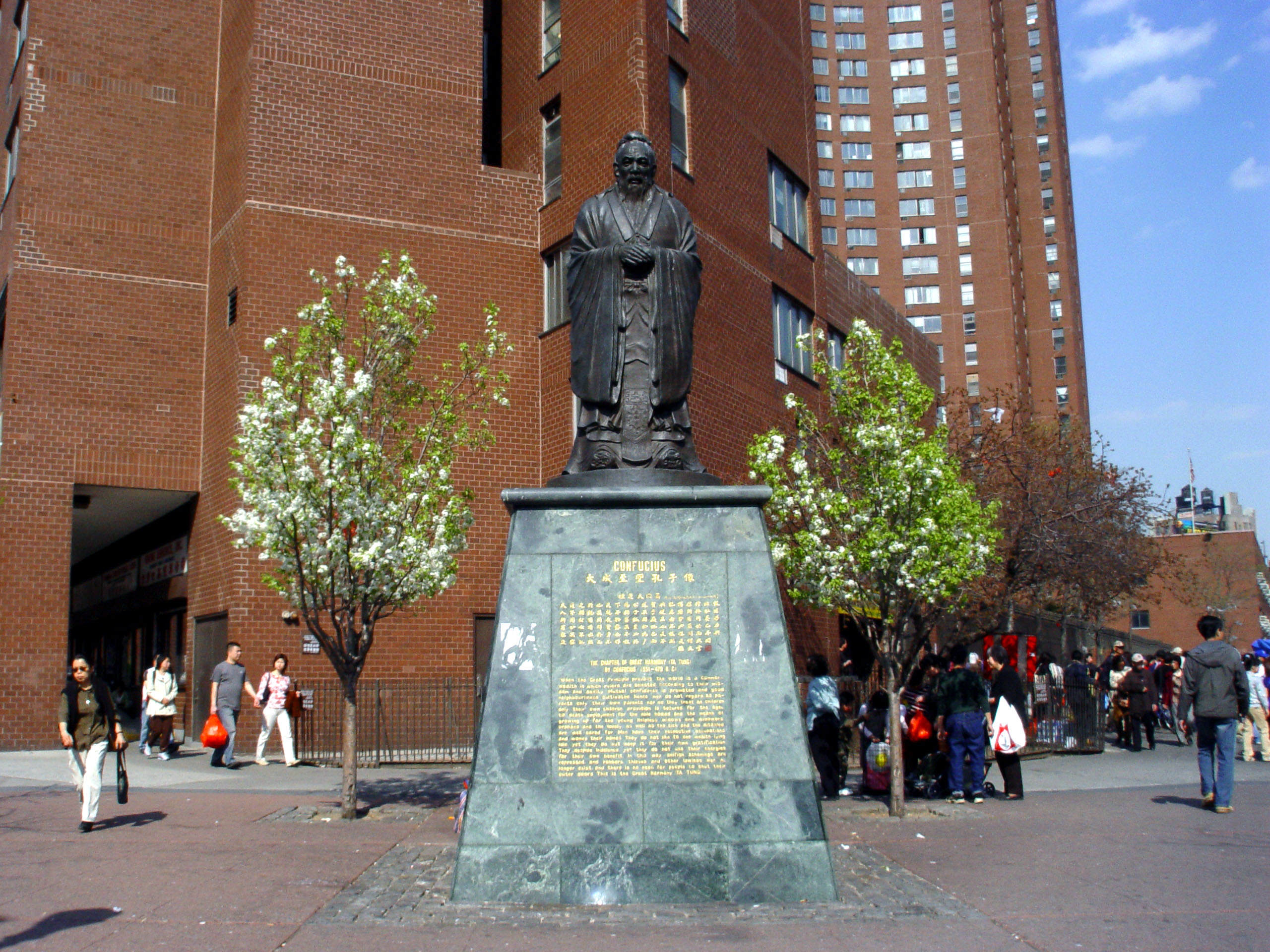 Fotografiert von Martin Dürrschnabel Confucius Statue von Liu Shihs auf dem Confucius Plaza in China Town New York City.